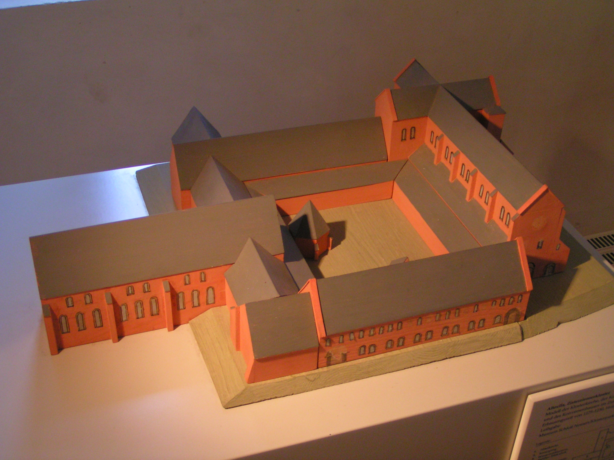 Kloster Altzella, Sachsen, Deutschland, Modell der Klosterkirche, der Konventbauten und des Konversenhauses im Zustand der Erbauungszeit um 1175-1230, Ausstellungstück in der Burg Meißen